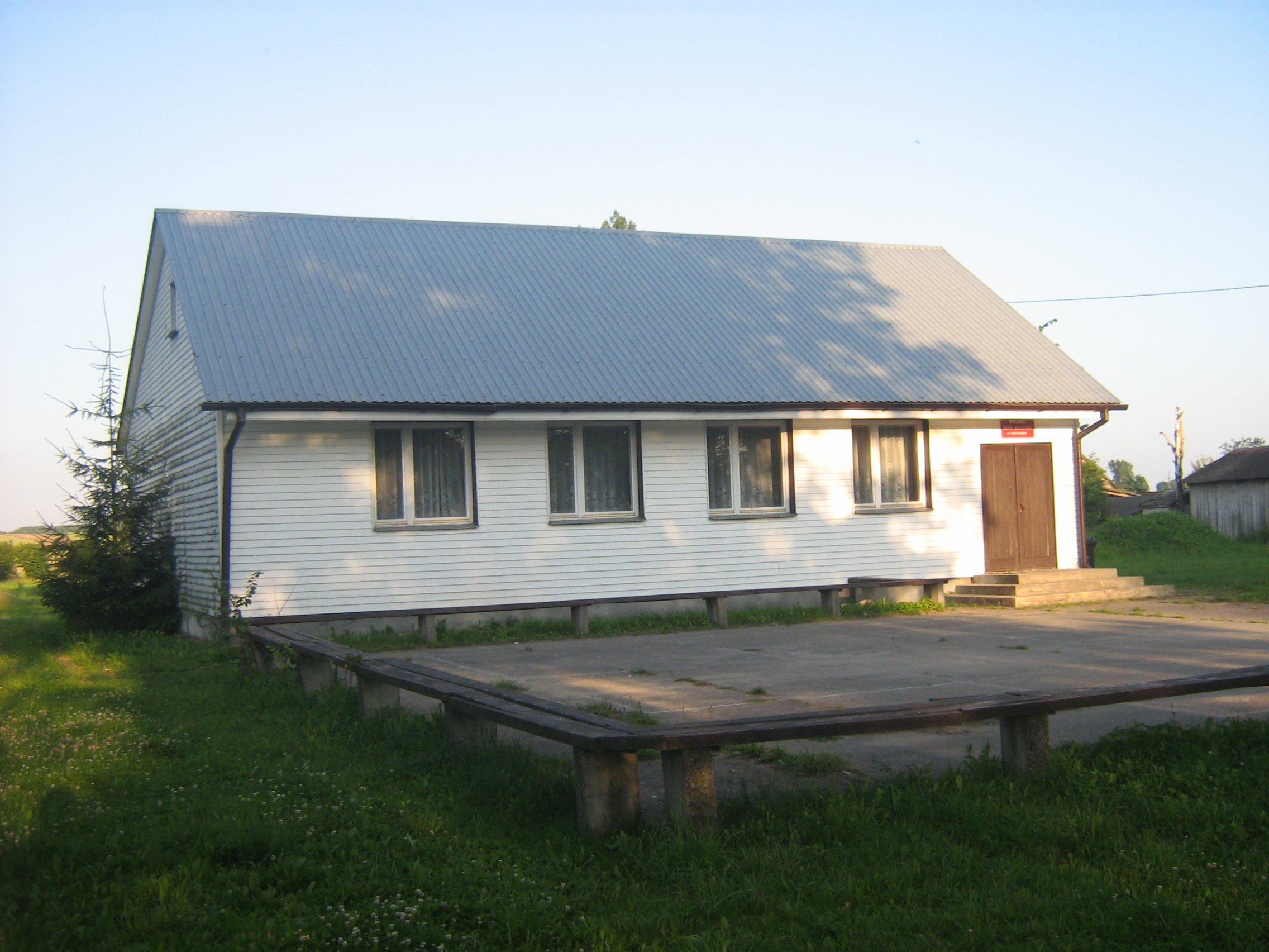 Świetlica wiejska w Trywieży.